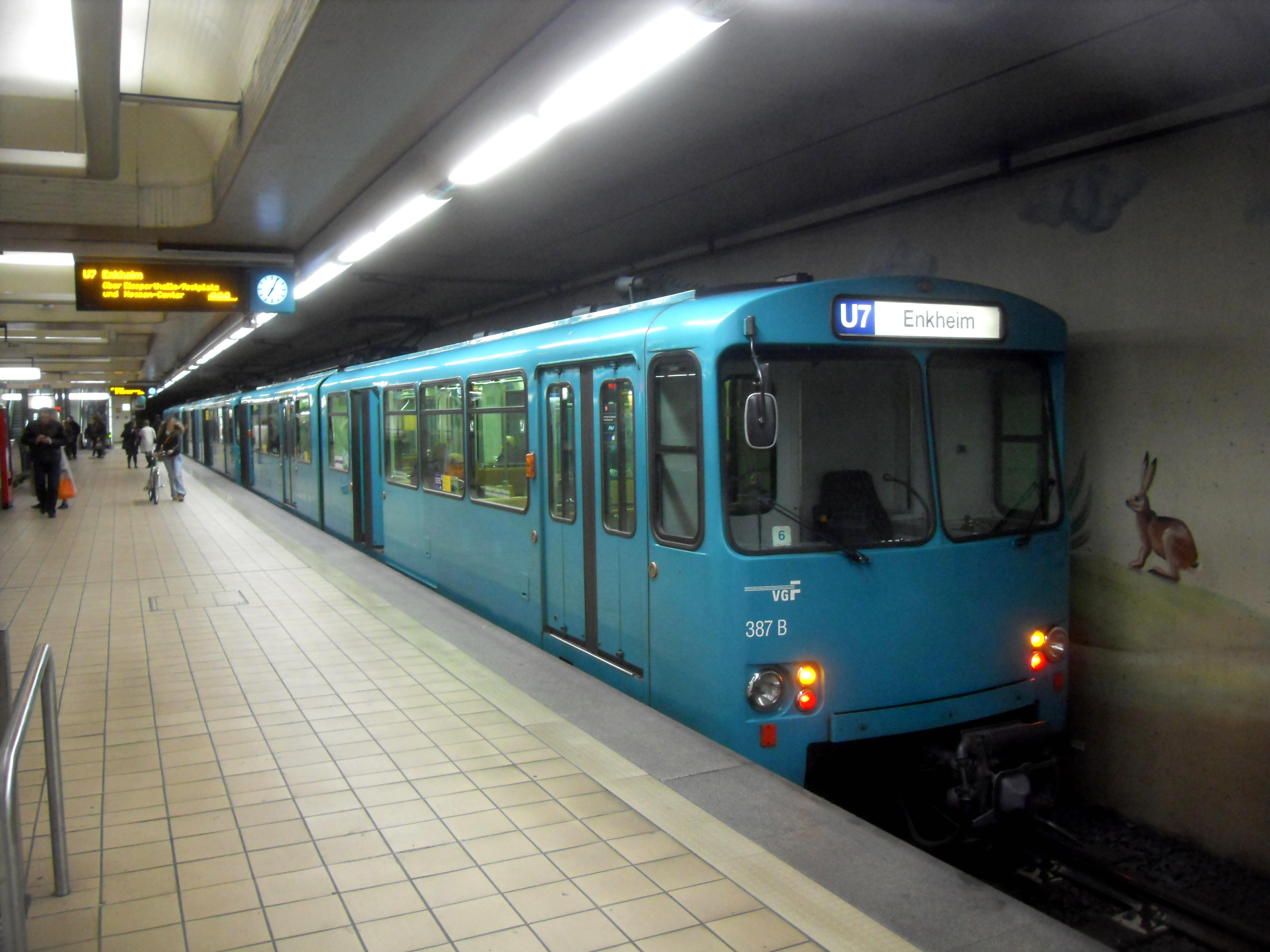 U 2-Triebwagen der U-Bahn Frankfurt im U-Bahnhof Zoo auf der Linie U 7 auf dem Weg nach Frankfurt-Bergen-Enkheim in Hessen (Deutschland)